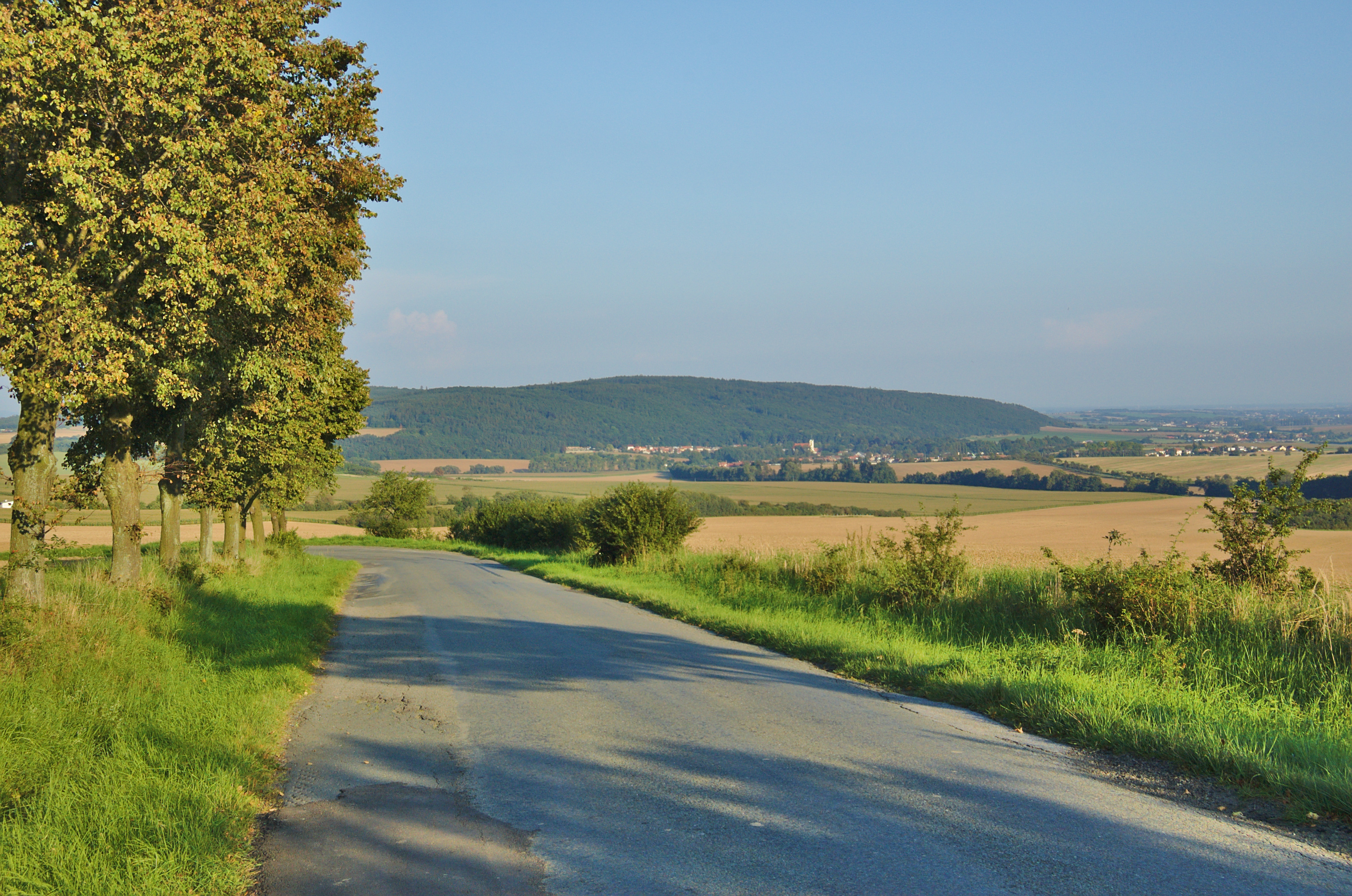 Pohled na Velký Kosíř ze silnice od Přemyslovic do Pěnčína, okres Prostějov